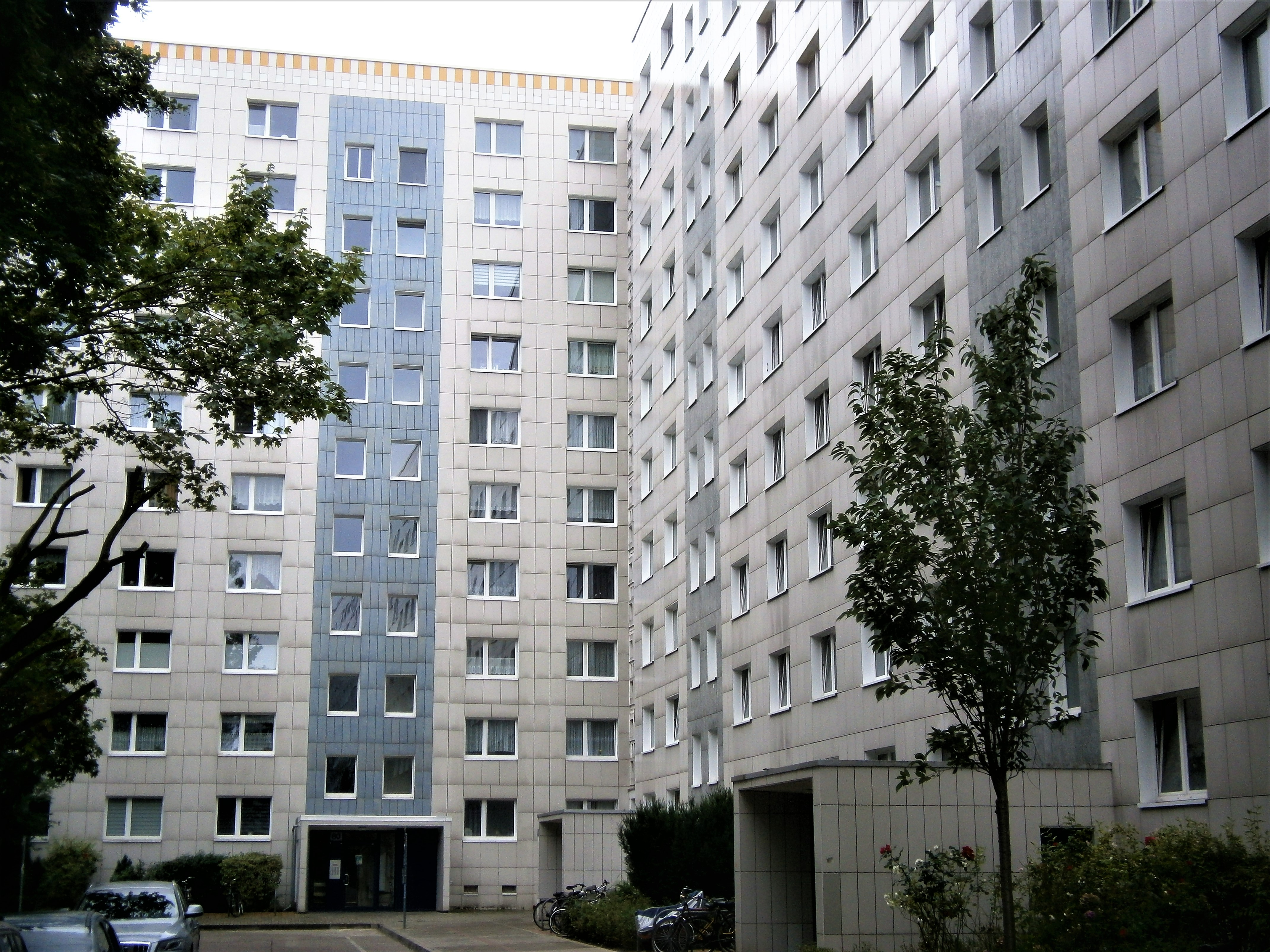 Die Andreasstraße ist eine Straße im Berliner Bezirk Friedrichshain-Kreuzberg, Ortsteil Friedrichshain. Angelegt wurde sie 1862 auf vorherigen Gartenland und 1863 benannt. Bis um 1900 waren die Grundstücke bebaut und bis 1930 wurde verdichtet. Bei Luftangriffen im Zweiten Weltkrieg wurde die Gebäude schwer getroffen. So ist die Straße seit den 1950er Jahren mit wiederhergestellten Altbauten, aber besondres durch Plattenbau-Wohnblöcke aber seit 1990 auch durch Hotel- und Bürobauten im Umfeld des Ostbahnhofs charakterieisiert. Das Bild zeigt: QP71-Wohnblöcke Andreas-/ Singerstraße mit den Hauseingängen und Zufahrtstraße von der zur Straße abgewandten Rückseite. Andreasstraße 29, 30, Singerstraße 80.